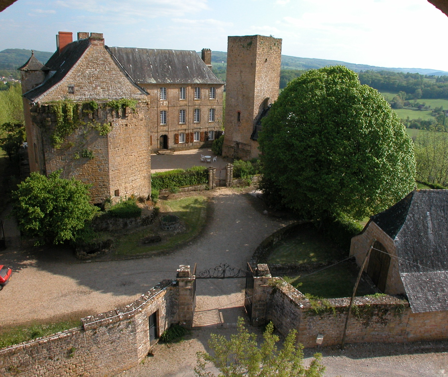 Château de Cavagnac